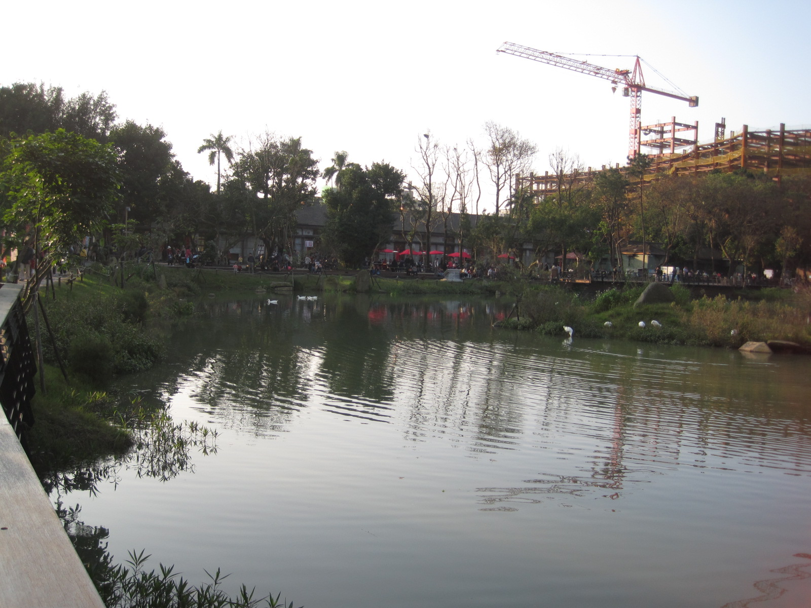 中文（台灣）: 松山文創園區東部生態池。